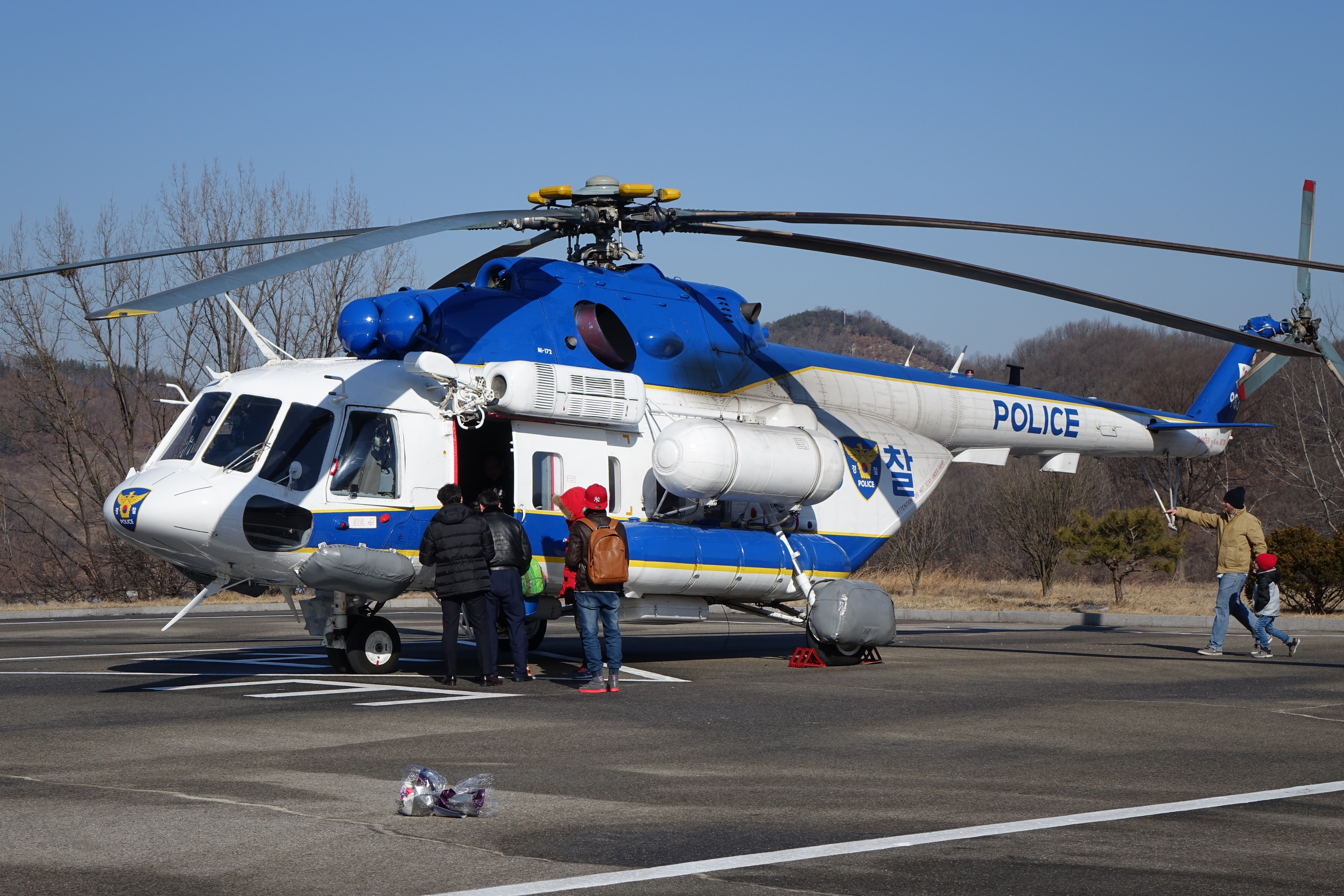 20150209-20150214최광모 촬영